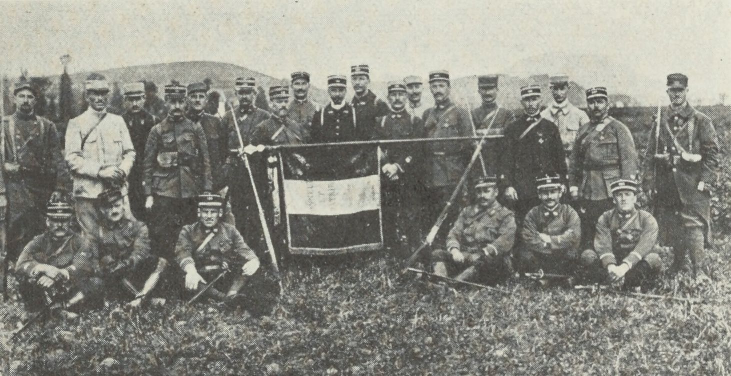 Le Drapeau des chasseurs confié à la garde du Bataillon. (Anould, août 1915).